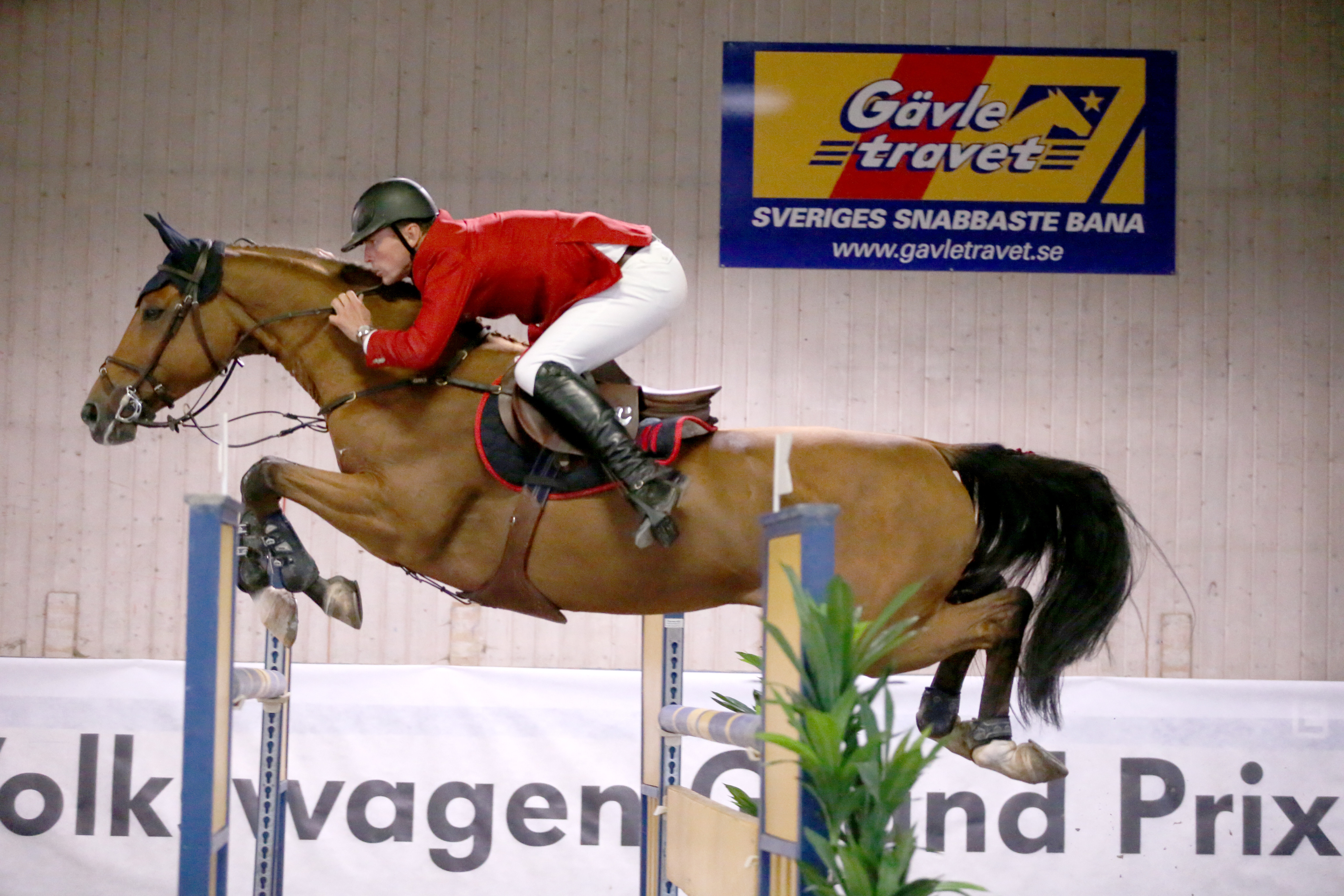 Peder Fredricson med Holliday KLG vann premiäromgången av Volkswagen Grand Prix, den första delomgången av tre, innan final på Flyinge i november.